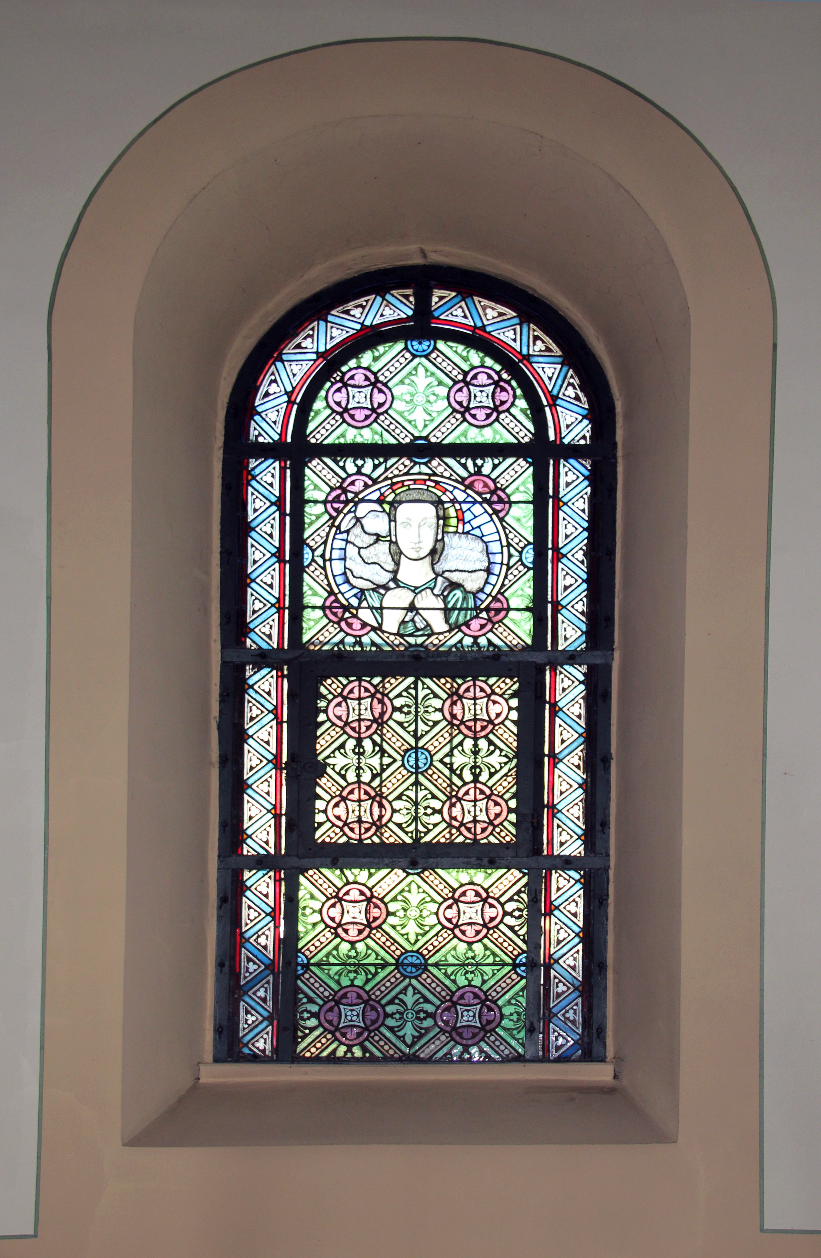 Marienkapelle Frauenthal, Bleiglasfenster mit der Darstellung: Jesus als guter Hirte